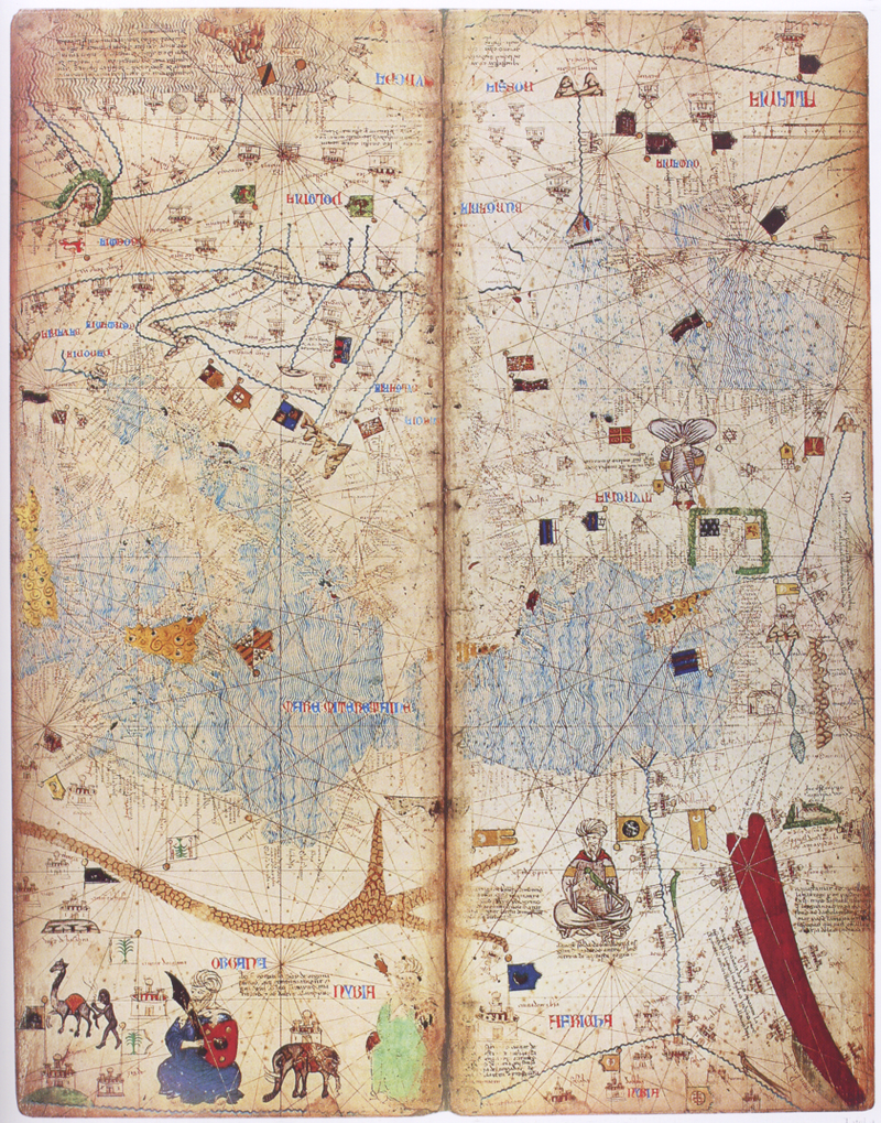 Eines von sechs auf Pergament gezeichneten Doppelbildern des Katalanischen Weltatlasses aus der Kartographenschule von Mallorca (vor 1380).